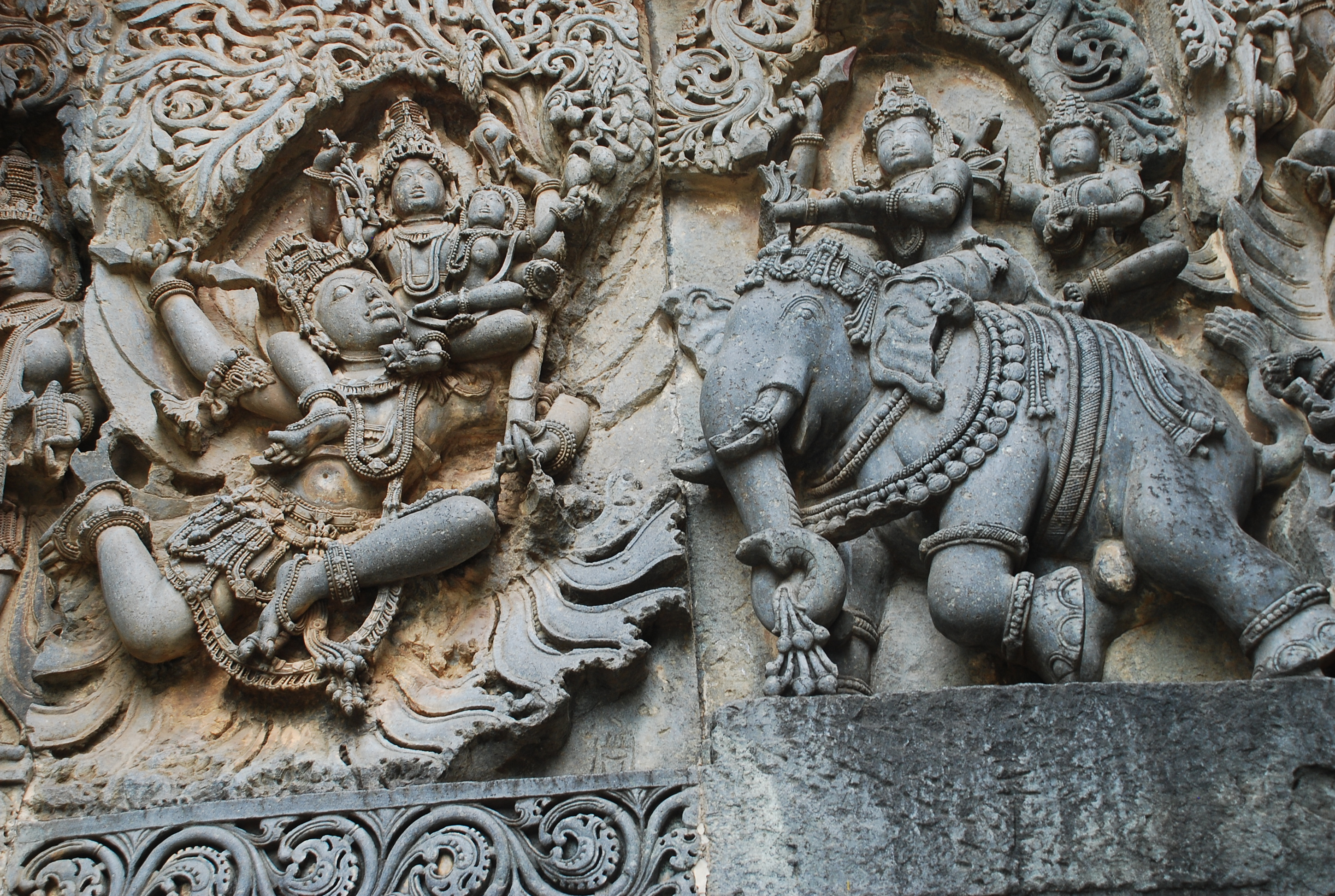 ಕನ್ನಡ: ಶಿಲೆಯಲ್ಲಿ ಪಾರಿಜಾತ ಅಪಹರಣದ ಕತೆ